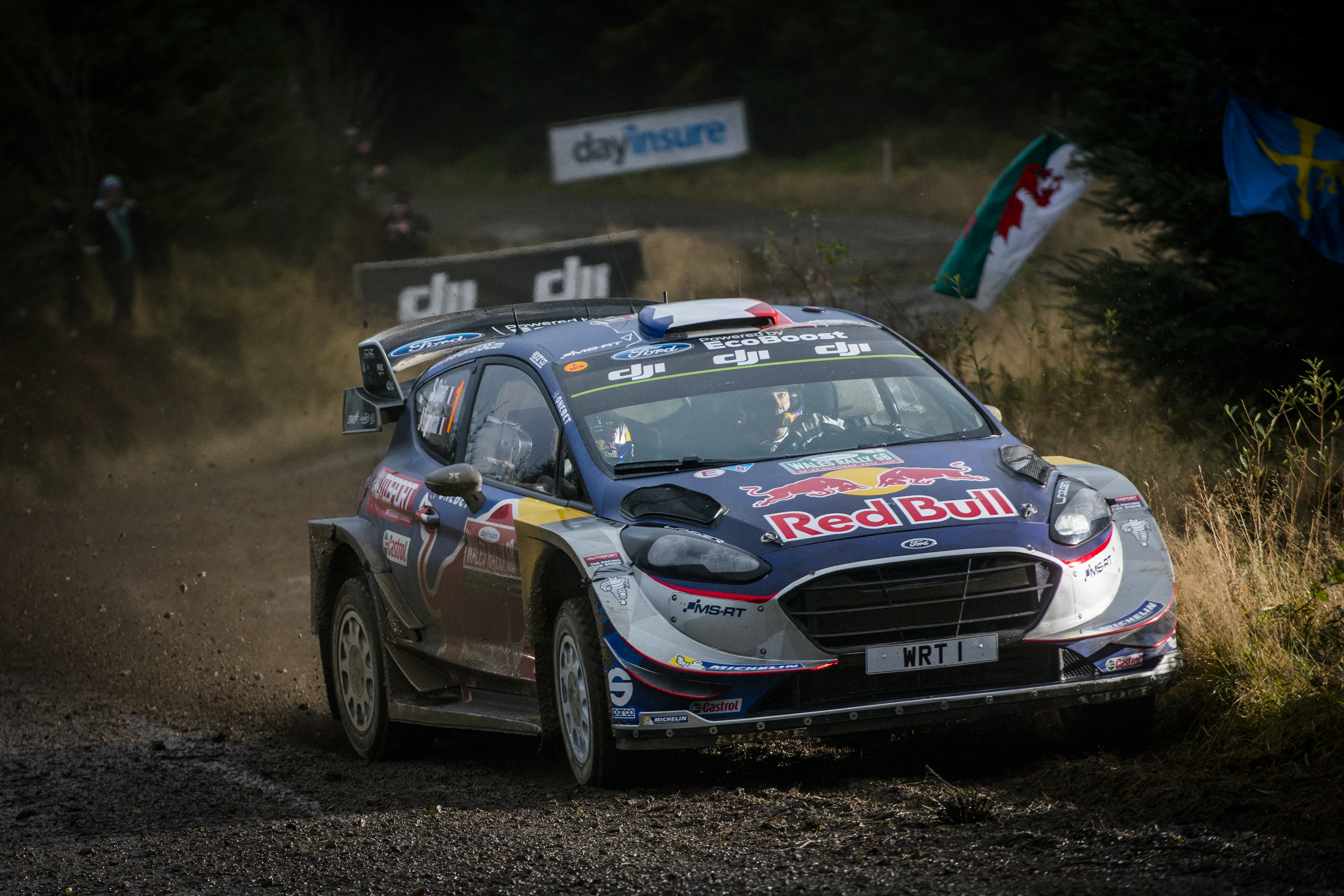 Sébastien Ogier in Wales Rally GB 2017